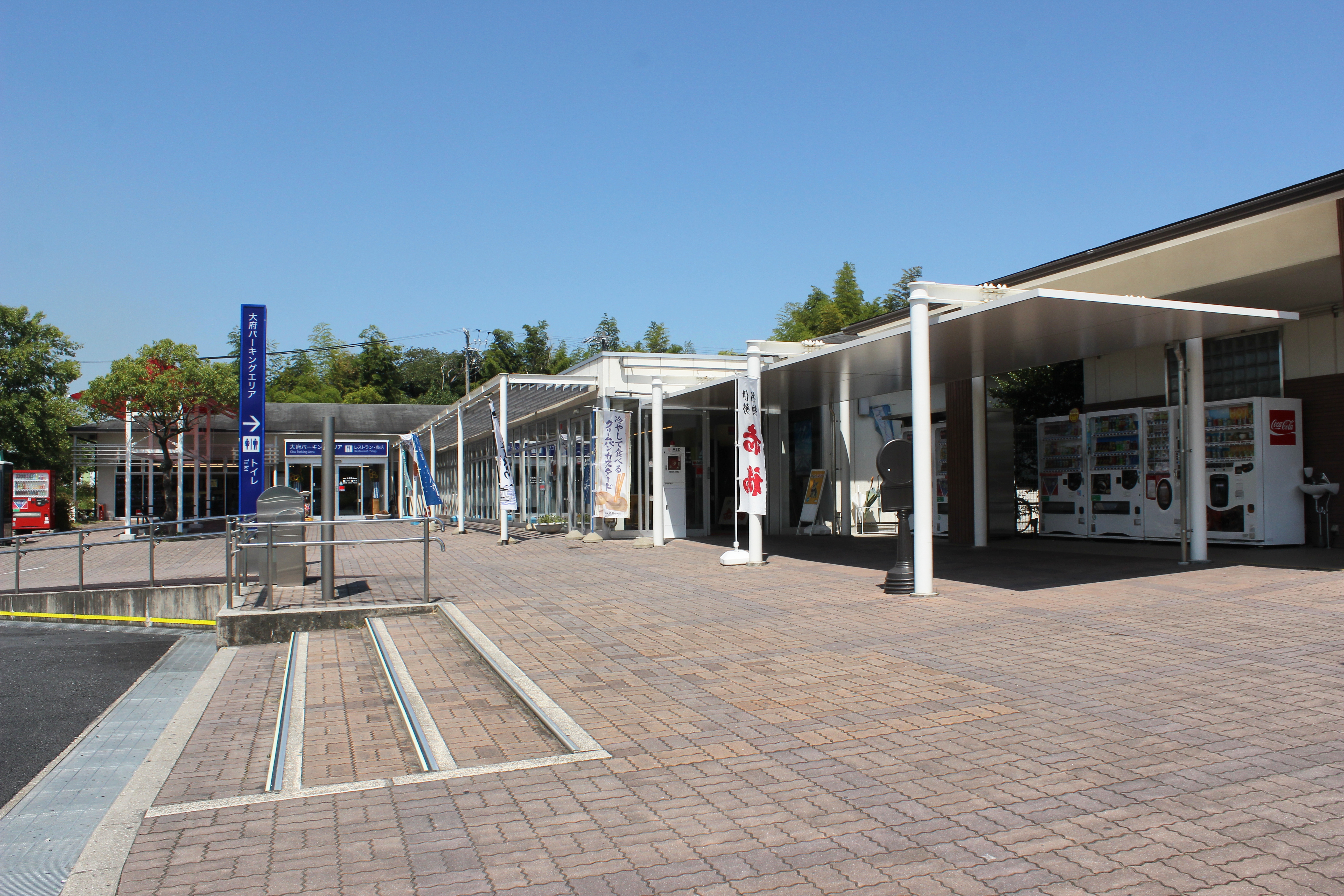 知多半島道路 大府PA